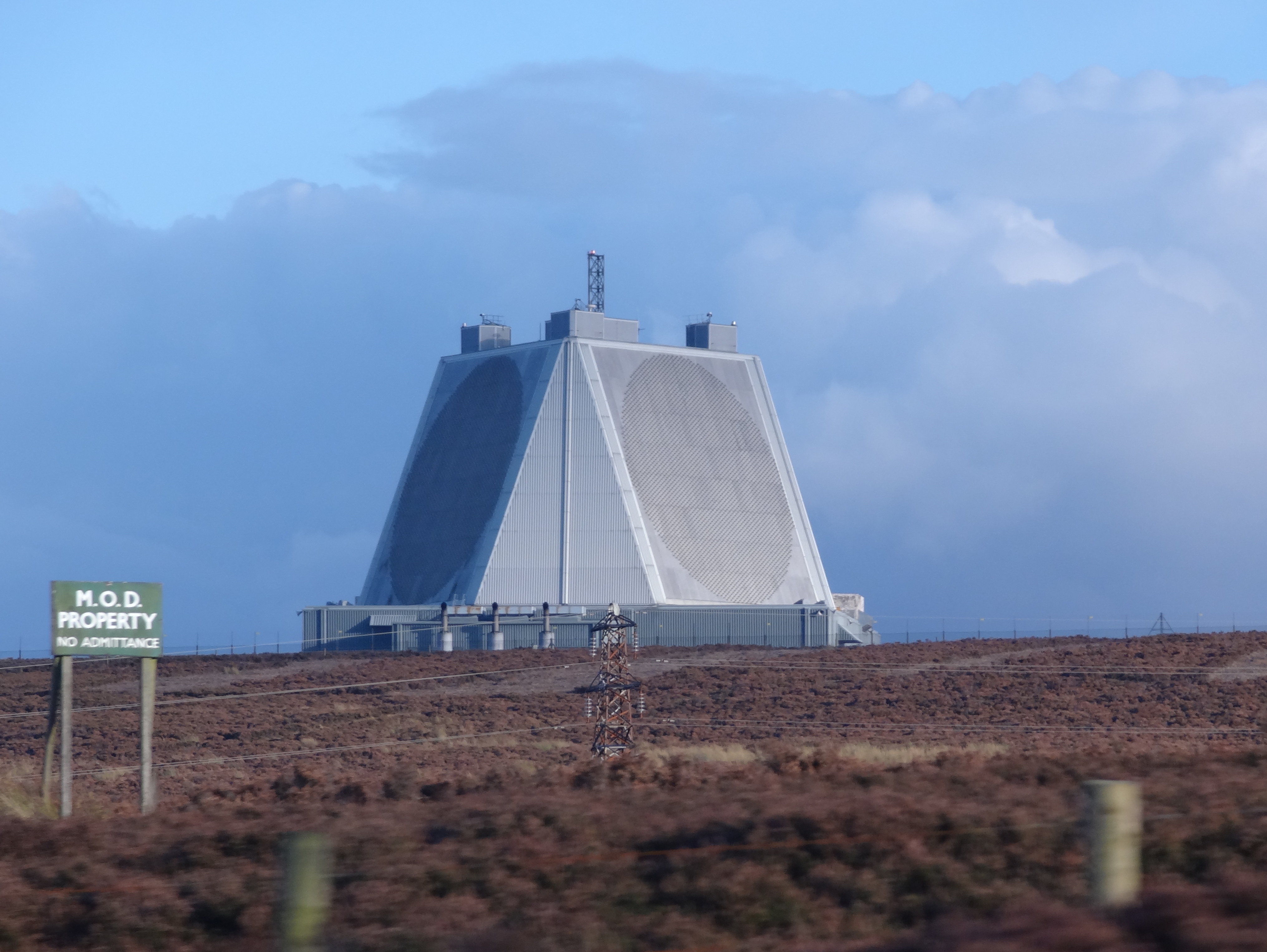 Solid State Phased Array Radar (SSPAR) at RAF Fylingdales, North Yorkshire, UK